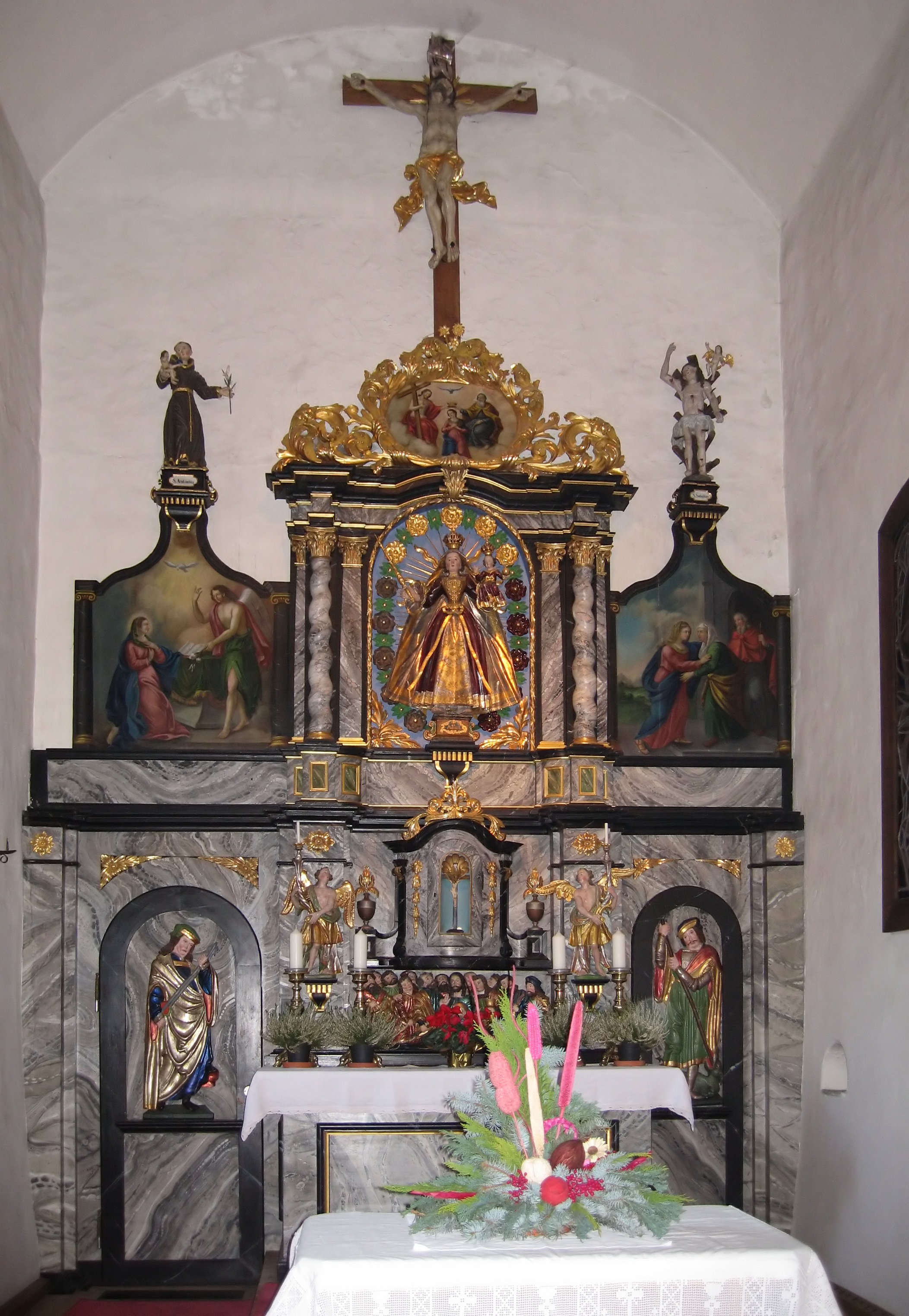 Der Altar der Kapelle Venserbild in Vandans /Montafon/Österreich